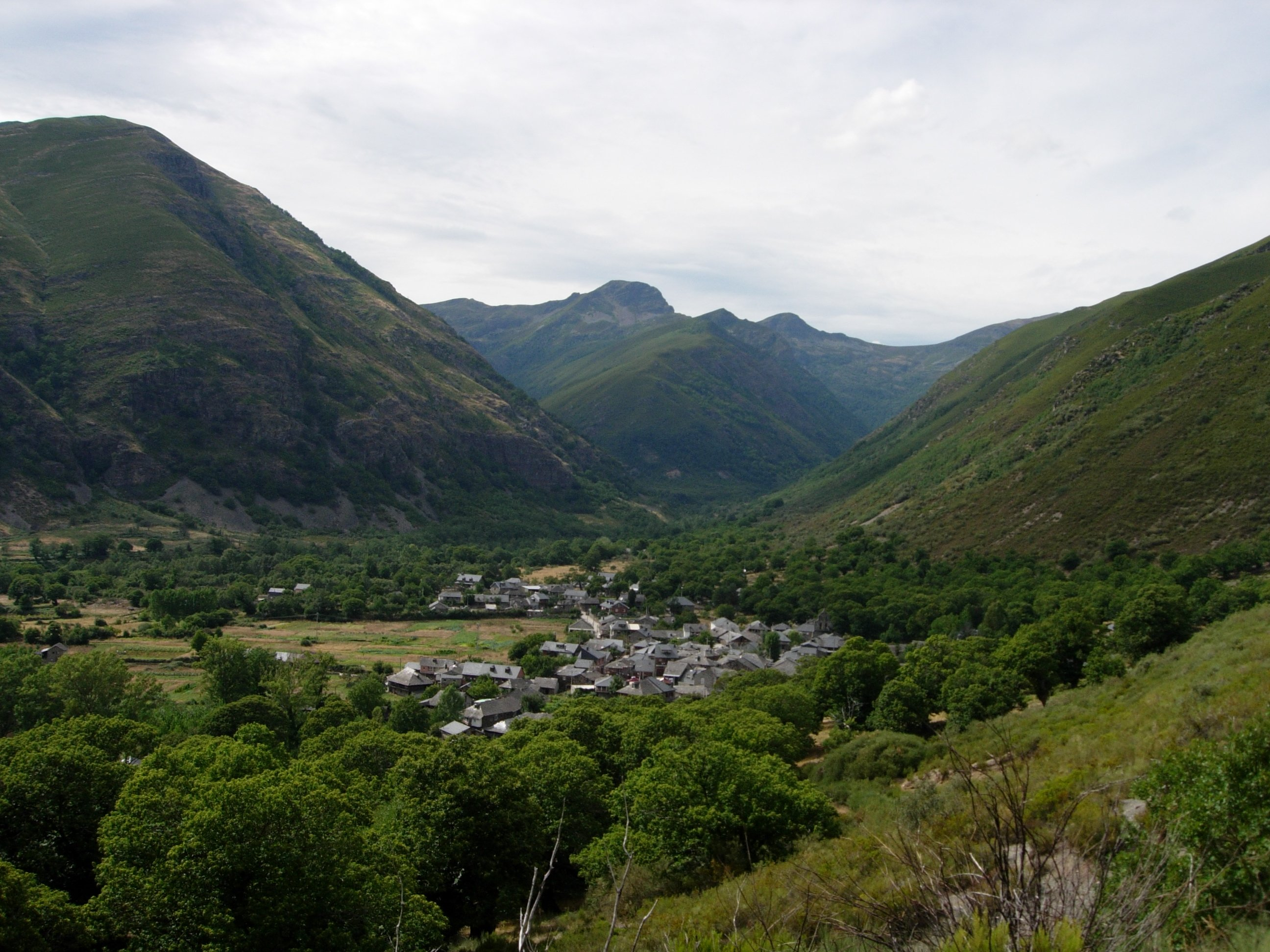 Imagen del pueblo de Burbia, en el municipio de Vega de Espinareda (provincia de León, España)